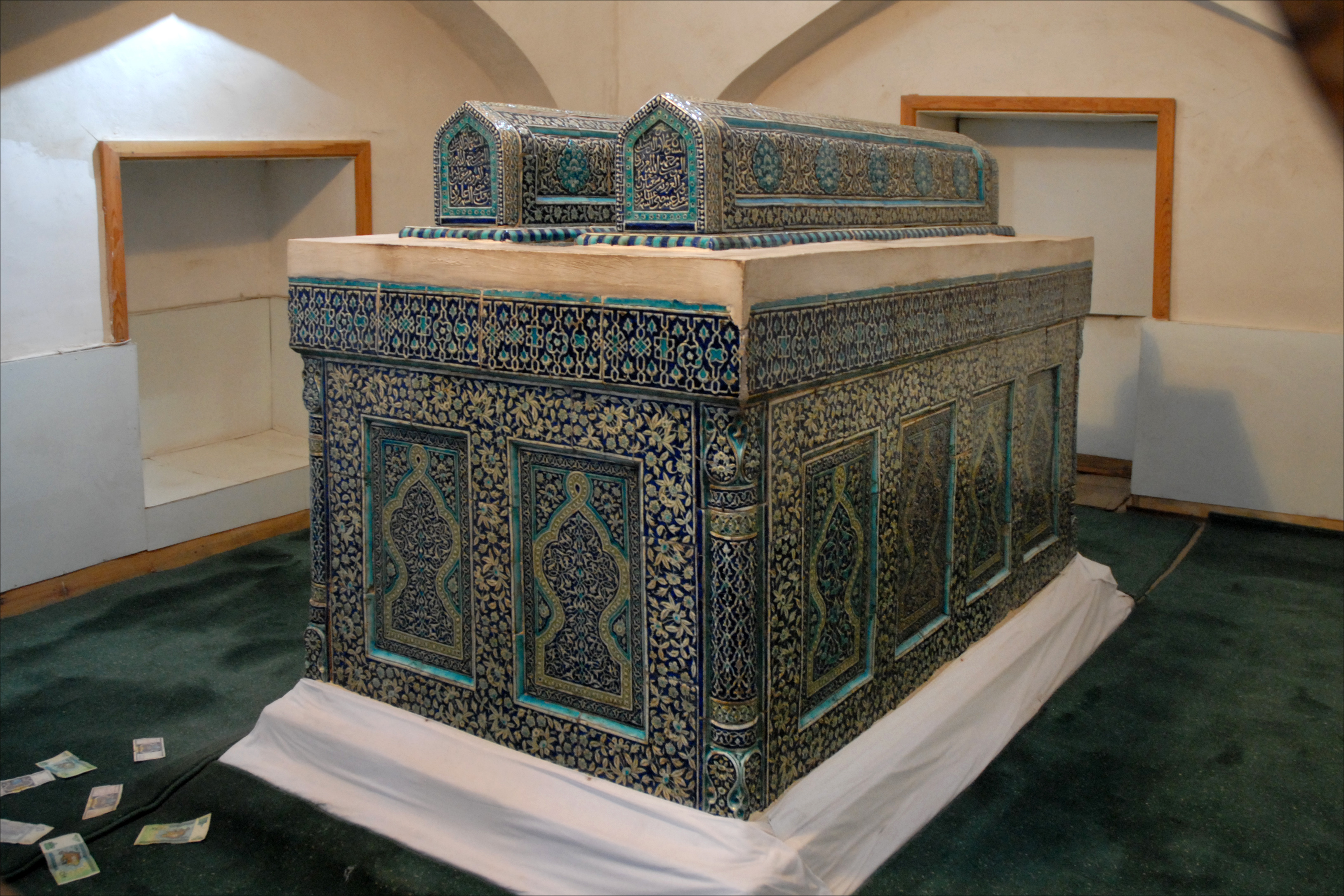 Le tombeau du cheik soufi Said Alauddin mort en 1303. La tombe est couverte de majolique aux motifs végétaux bleus et blancs, réalisée par Amir Kulal.